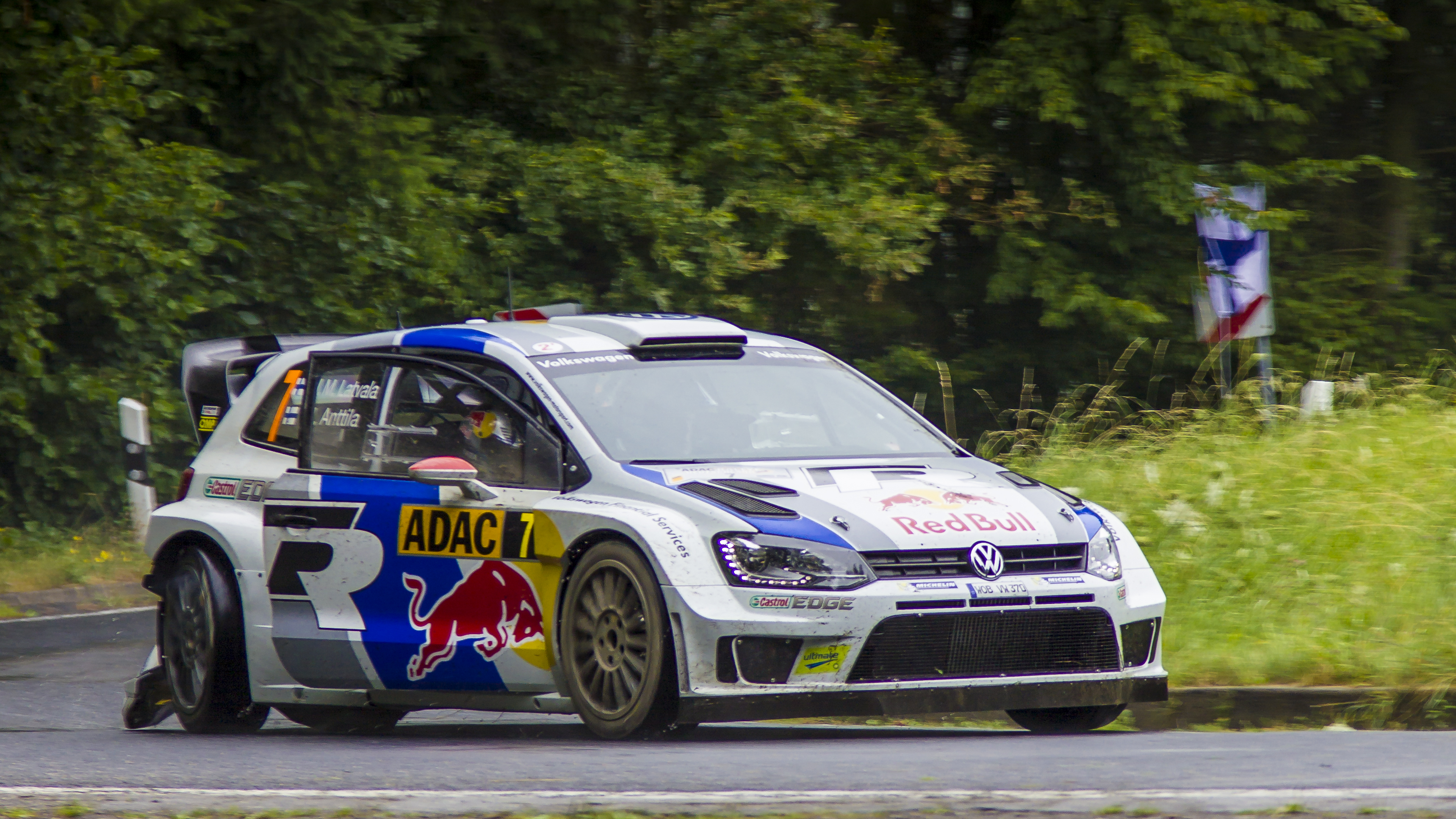 VOLKSWAGEN MOTORSPORT